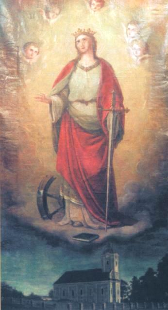 Katarzyna Aleksandryjska w kościele w Jastrzębiu Górnym